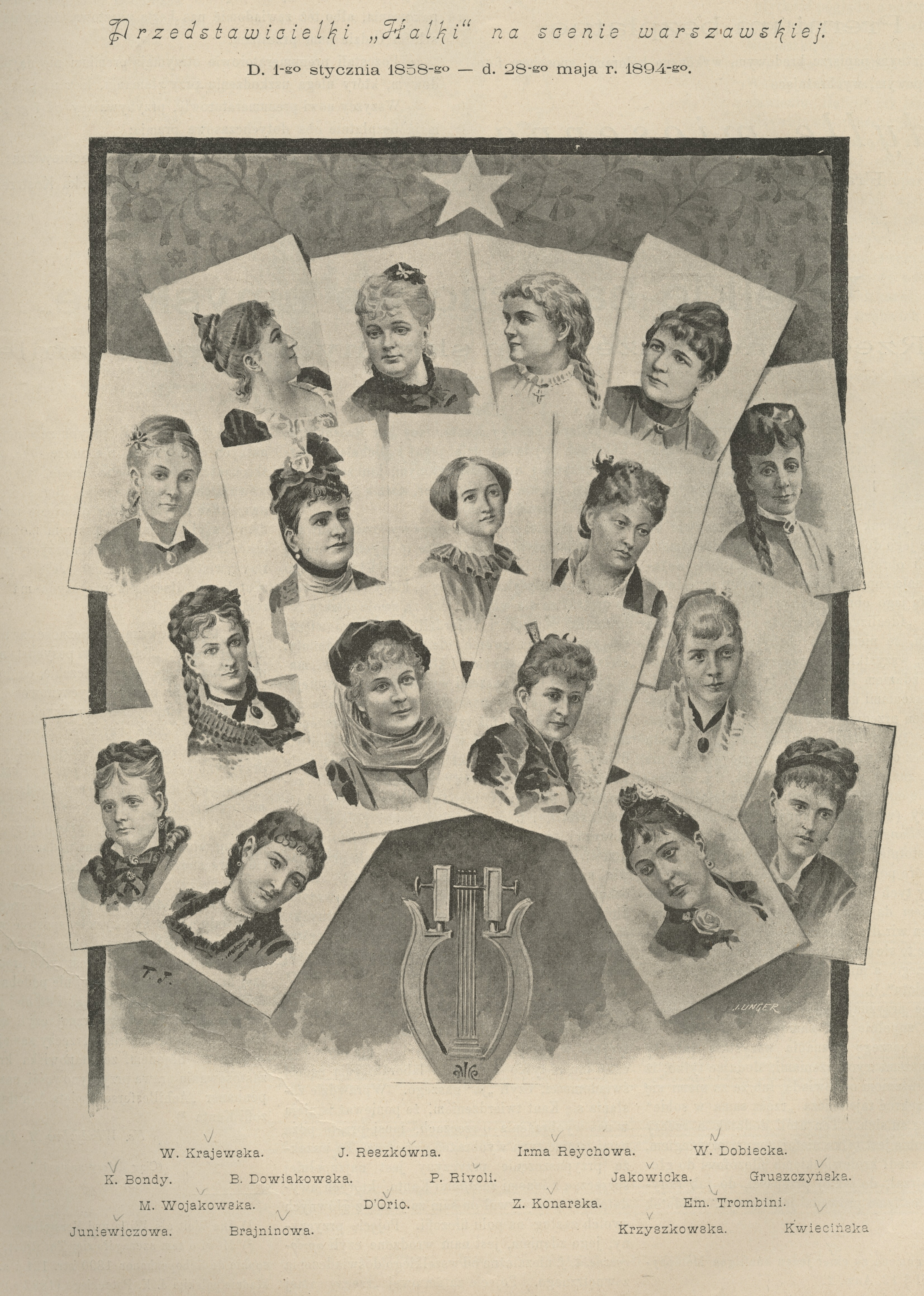 Przedstawicielki „Halki” na scenie warszawskiej. Dnia 1 stycznia 1858 — 28 maja 1894 : K. Bondy; Brajninowa; W. Dobiecka [...]